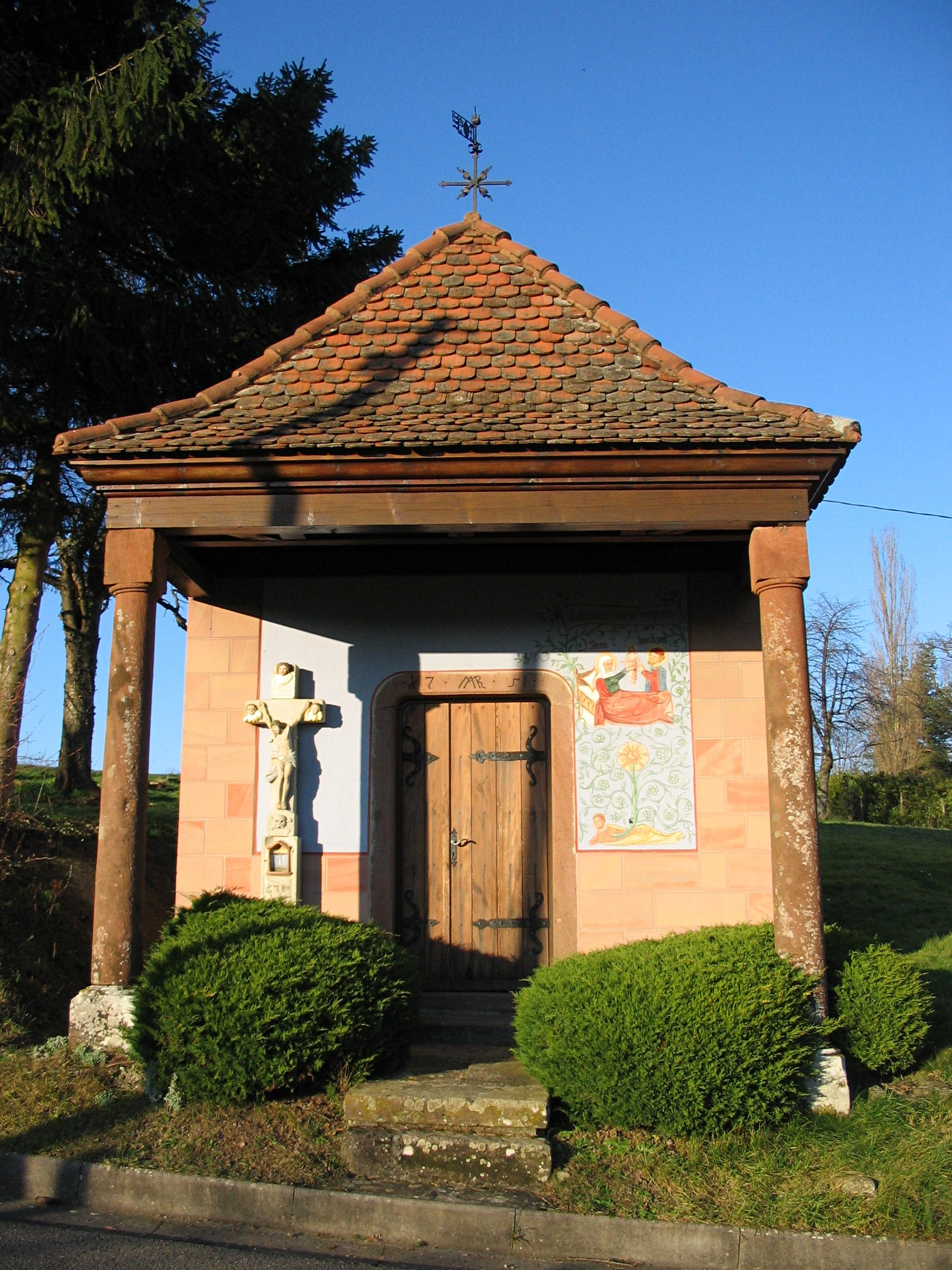 Chapelle Notre-Dame à Birkenwald (Bas-Rhin). Datée de 1751, elle se situe à l'ancien emplacement du village, au-dessus du village actuel.